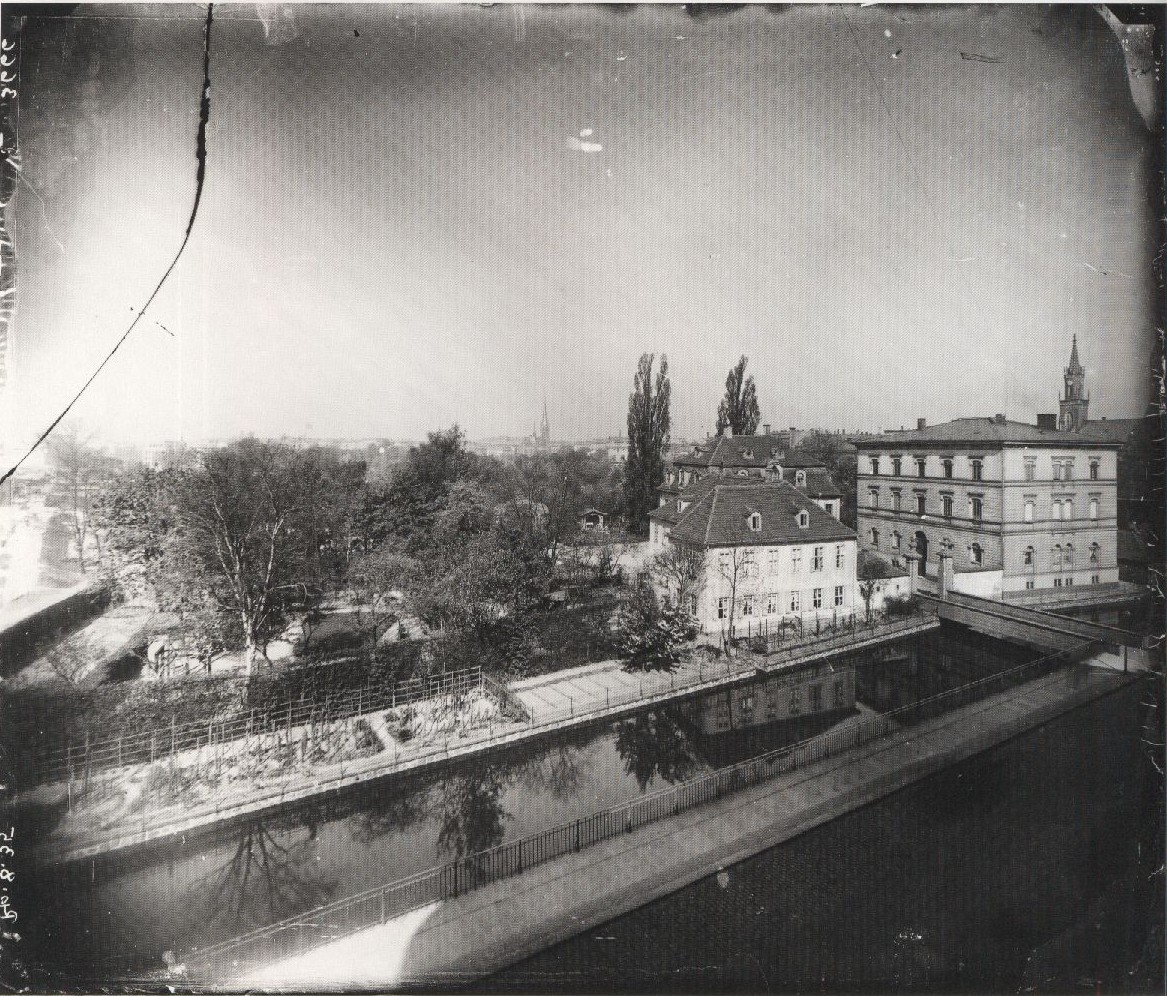 Schwägerichens Garten in der Harkortstraße, Leipzig, vor 1887.